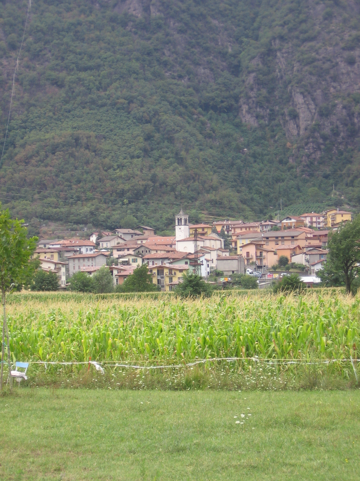 Rogno, Bergamo, Italy